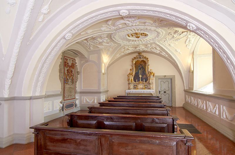 Marienkapelle im Paderborner Dom